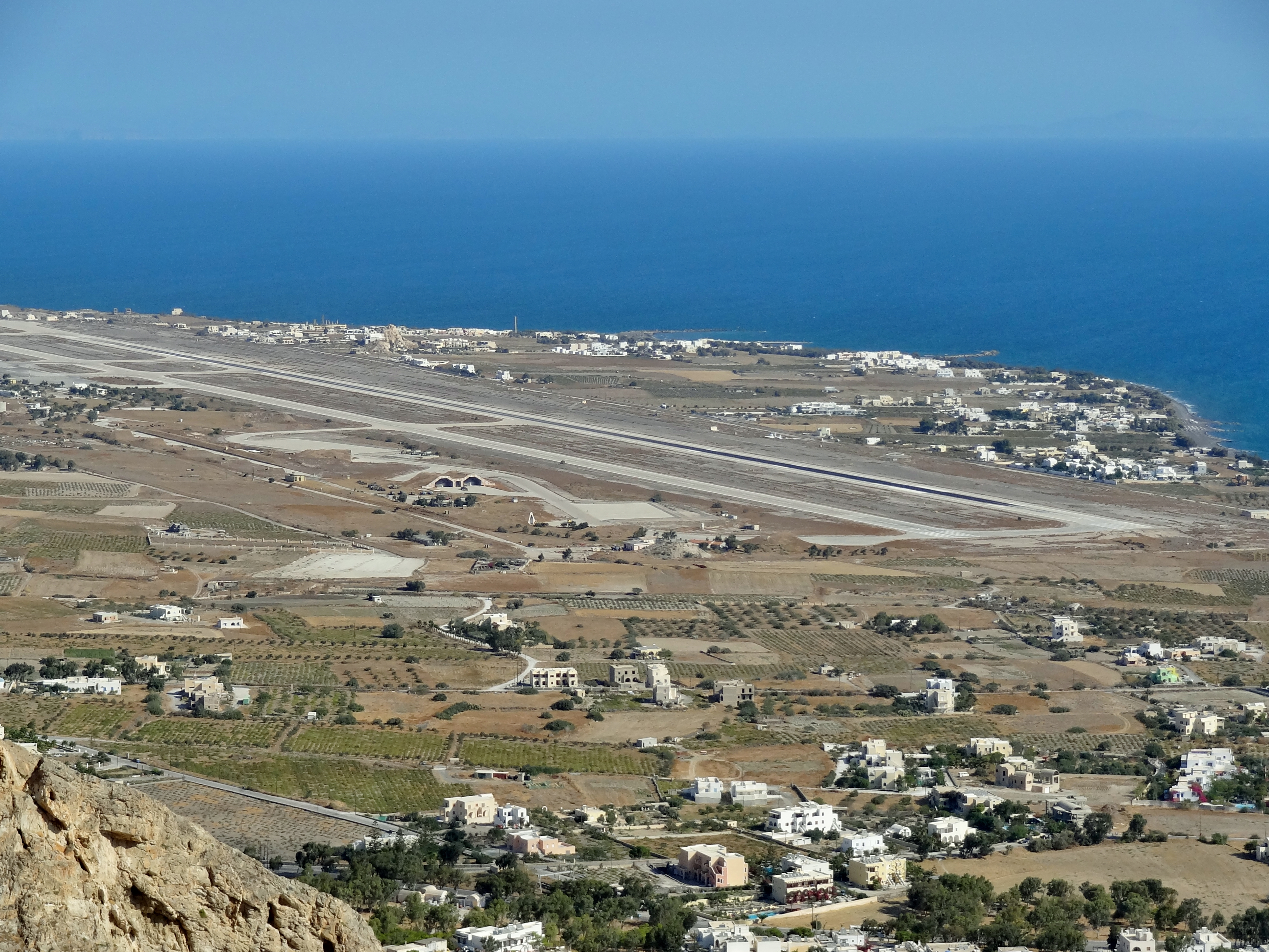 Flughafen Santorin (Αερολιμένας Σαντορίνης) bei Kamari, Santorin (Thera), Kykladen, Griechenland